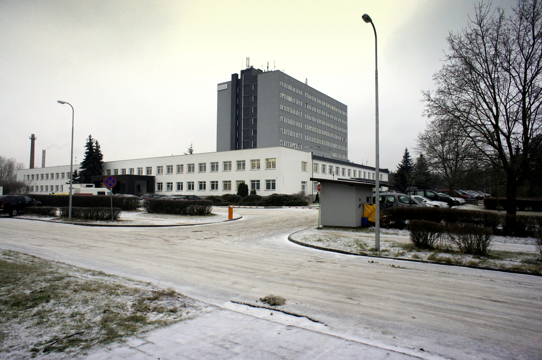 Szpital w Puszczykowie im. prof. Stefana Tytusa Dąbrowskiego S A przy ul. Kraszewskiego 11. Powstał w 1975 r. (pierwsze przyjęcia w 1976 r.) jako Okręgowy Szpital Kolejowy.